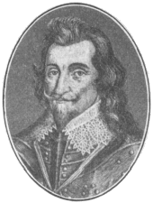 Dodo von Knyphausen (1583–1636), tysk militär i svensk tjänst, svensk fältmarskalk 1633